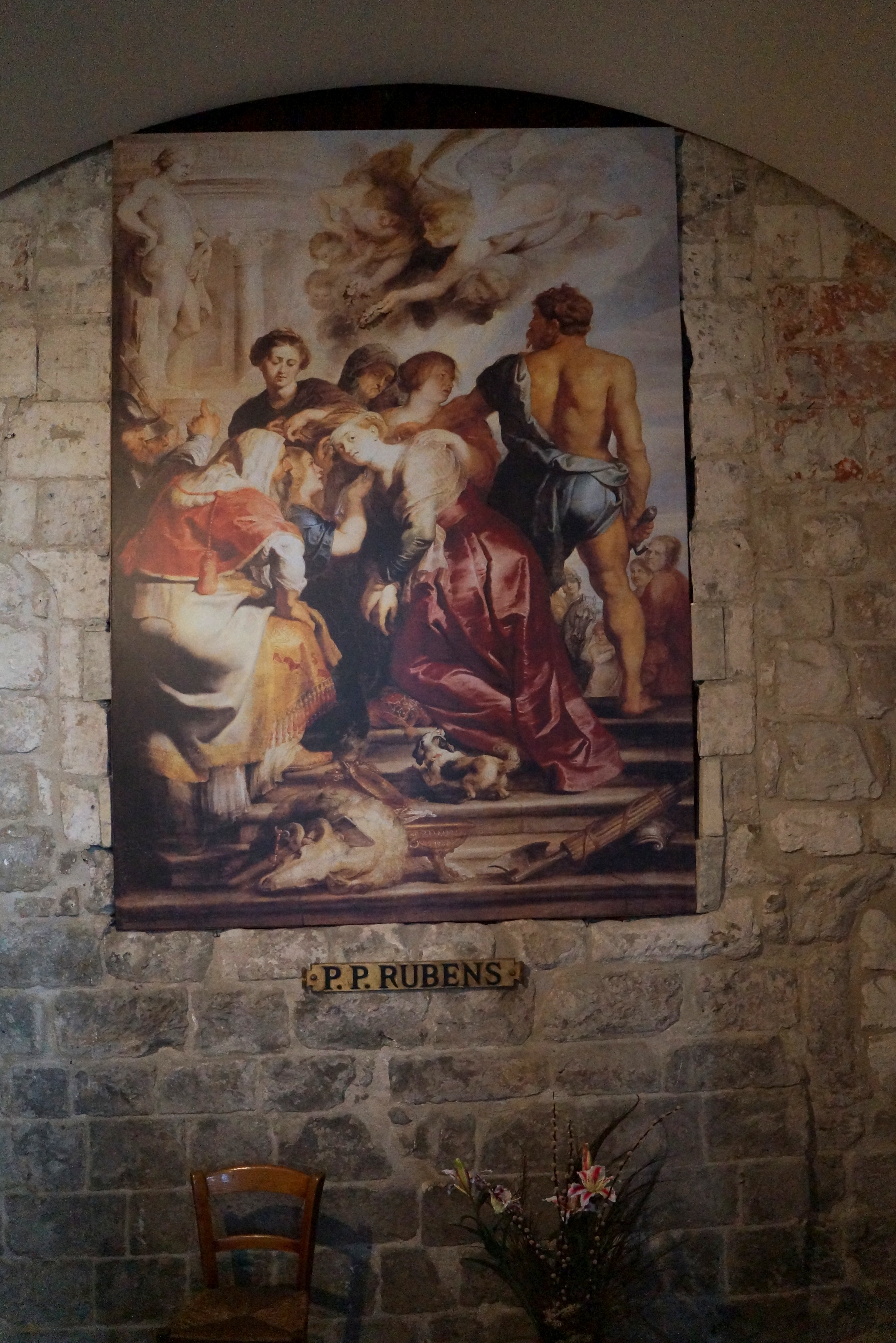 Fac-similé du tableau représentant le "Martyre de Sainte Catherine" (1615), situé dans la chapelle Saint Joseph. Propriété de l'église Sainte-Catherine, il est exposé au Palais des Beaux-Arts, à Lille (N° inventaire D 65-8).- Peter Paul Rubens (1577–1640) Alternative names Rubens, Pierre Paul Rubens, Pieter Paul Rubens, Sir Peter Paul RubensDescriptionFlemish painter, sculptor, draughtsman and printmakerDate of birth/death 28 June 1577 30 May 1640Location of birth/death Siegen AntwerpWork location Antwerp (1589-1600), Mantua (9 May 1600-1608), Spain (1603), Antwerp (1608-1640), Netherlands (1612), Paris (23 May 1623-29 June 1623, 4 February 1625-9 June 1625), Calais (November 1626), Paris (December 1626), Brussels (1627), Netherlands (10 July 1627-6 August 1627), Spain (26 August 1628-29 April 1629), London (18 May 1629-23 March 1630), Brussels (1631), Netherlands (November 1631), Affligem (September 1634)Authority control : Q5599 VIAF: 56647196 ISNI: 0000 0001 2134 1267 ULAN: 500002921 LCCN: n79055561 NLA: 36442606 WorldCat creator QS:P170,Q5599